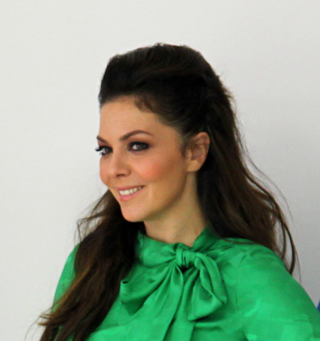 Srpski (latinica): Kristina Kovač